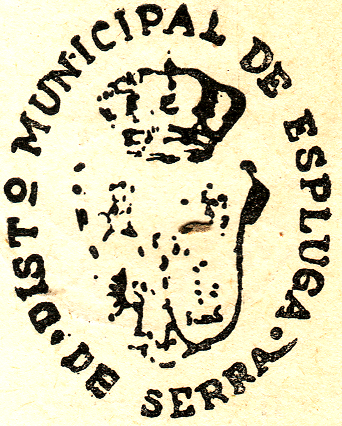 Antic segell municipal d'Espluga de Serra (Tremp, Pallars Jussà)